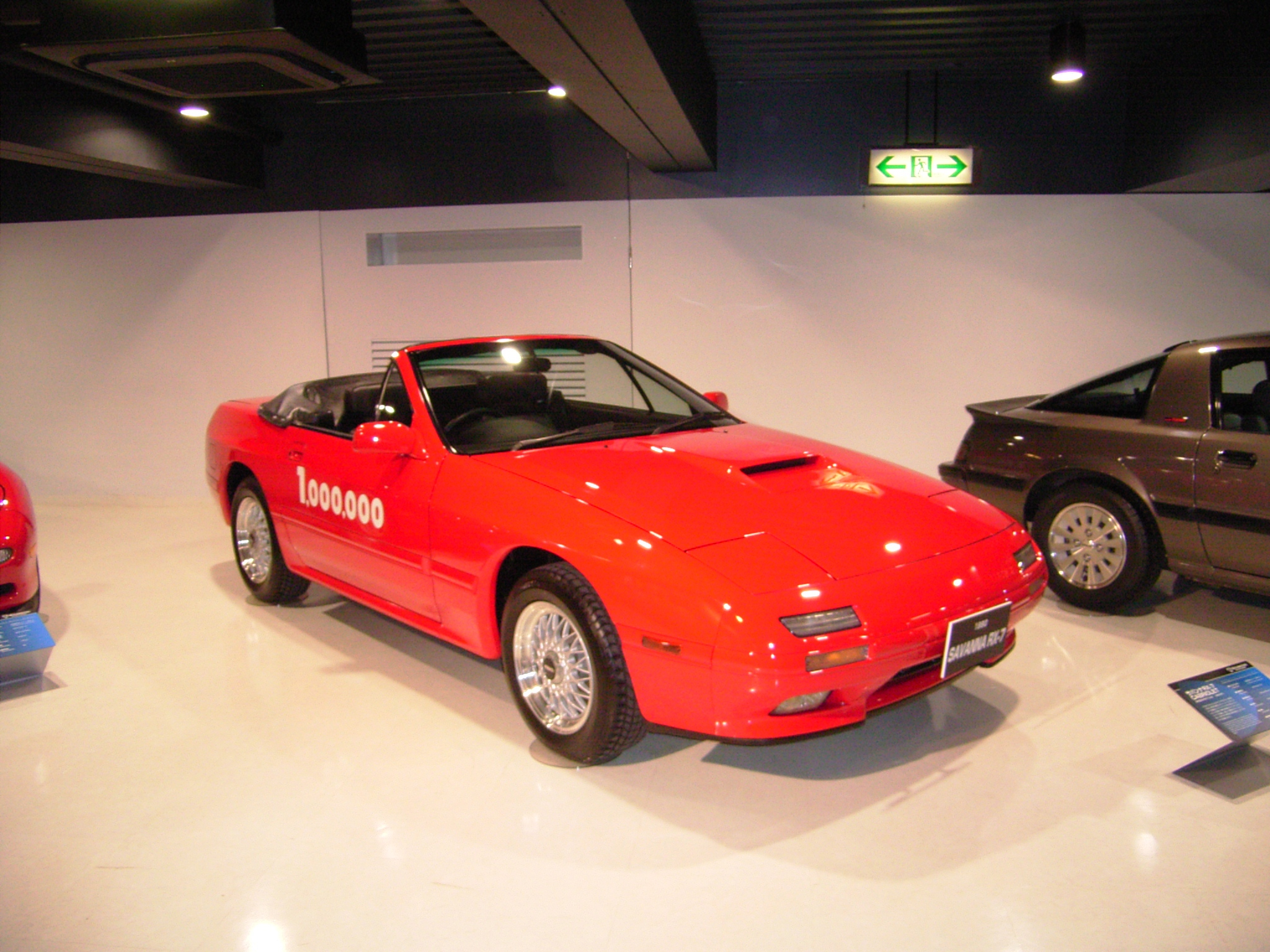 Mazda RX7 2nd generation(マツダ・RX-7、Mazda RX-7),Mazda Museum.